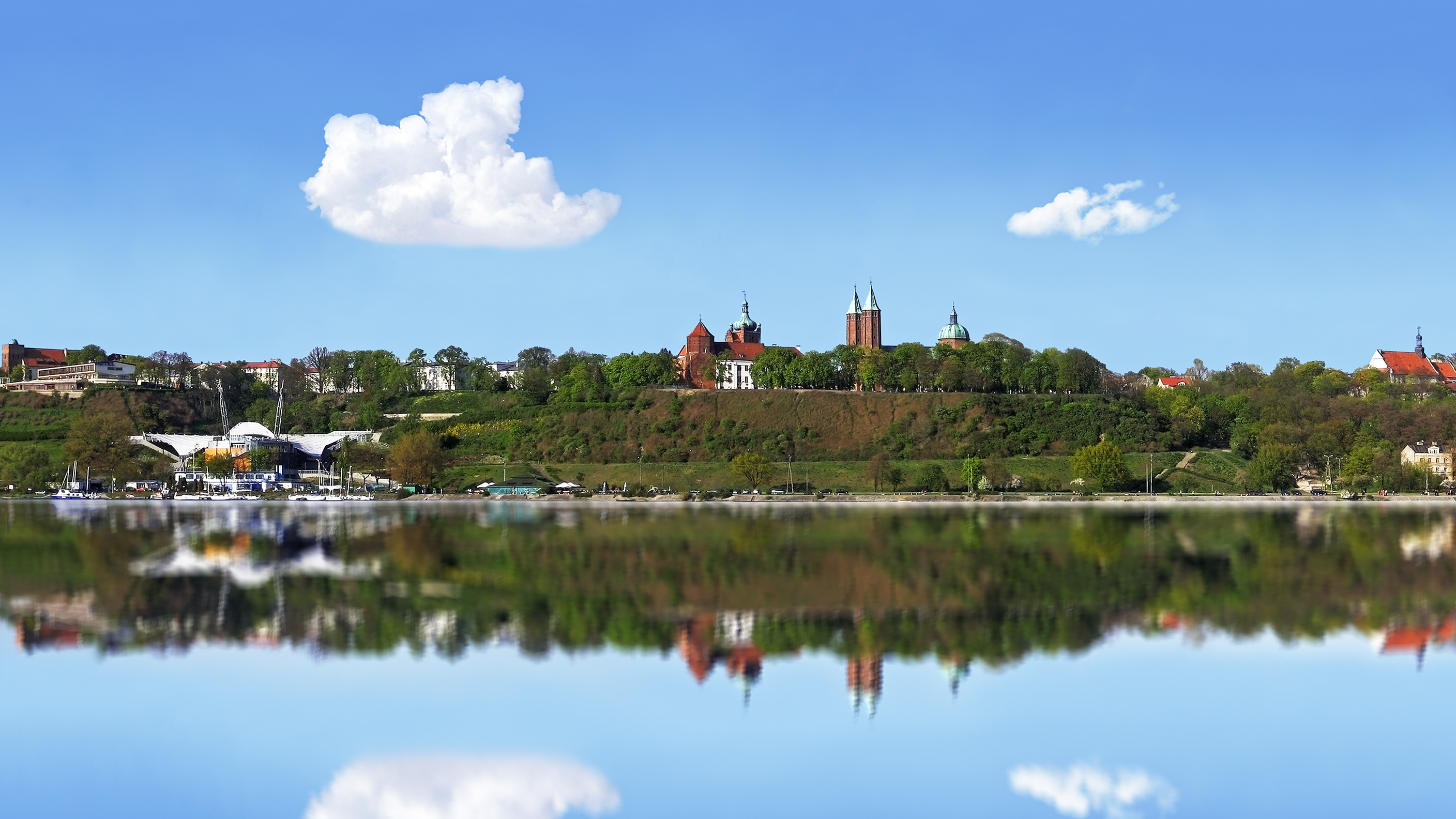 Płock, Tumskie Hill (Poland)